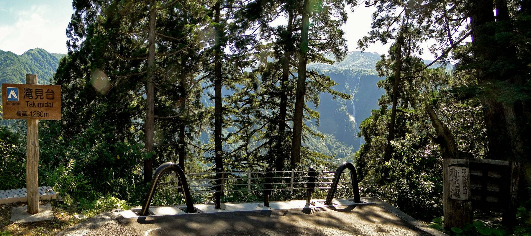 瀧見台から称名滝